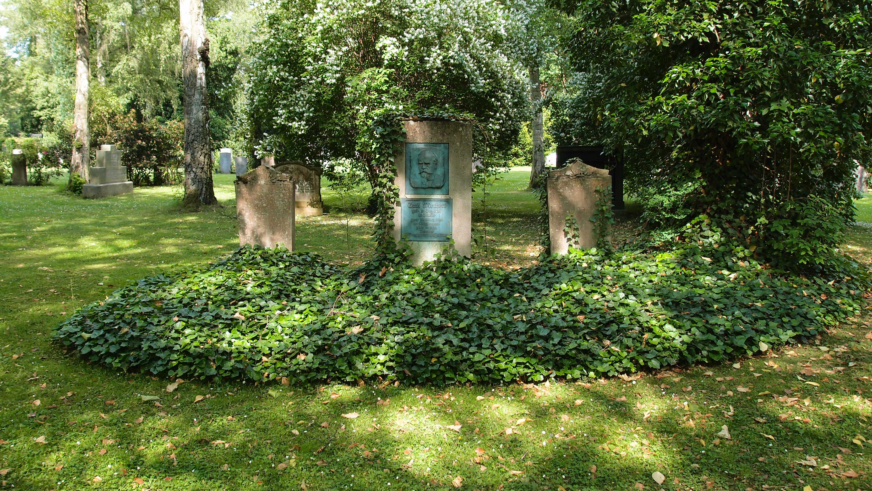 Grab von Emil Wiechert auf dem Friedhof an der Kasseler Landstraße in Göttingen